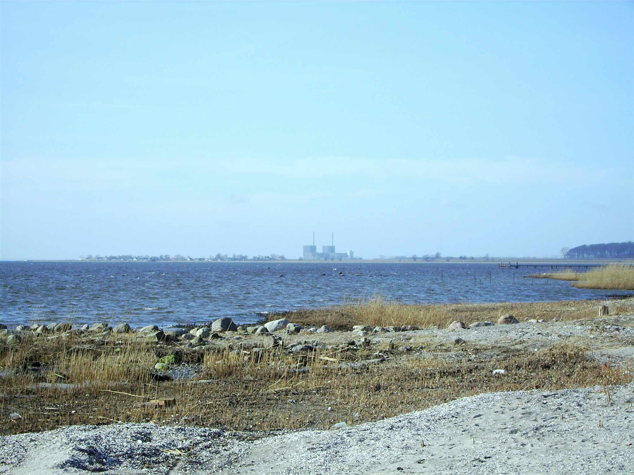 Barsebäck, gesehen vom 5km entfernten Bjärred